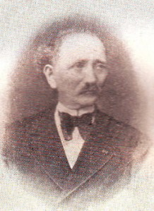 צילום דיוקן של הברון יעקב דה נוישאץ , בנקאי ונדיב יהודי שנפטר בשנת 1888